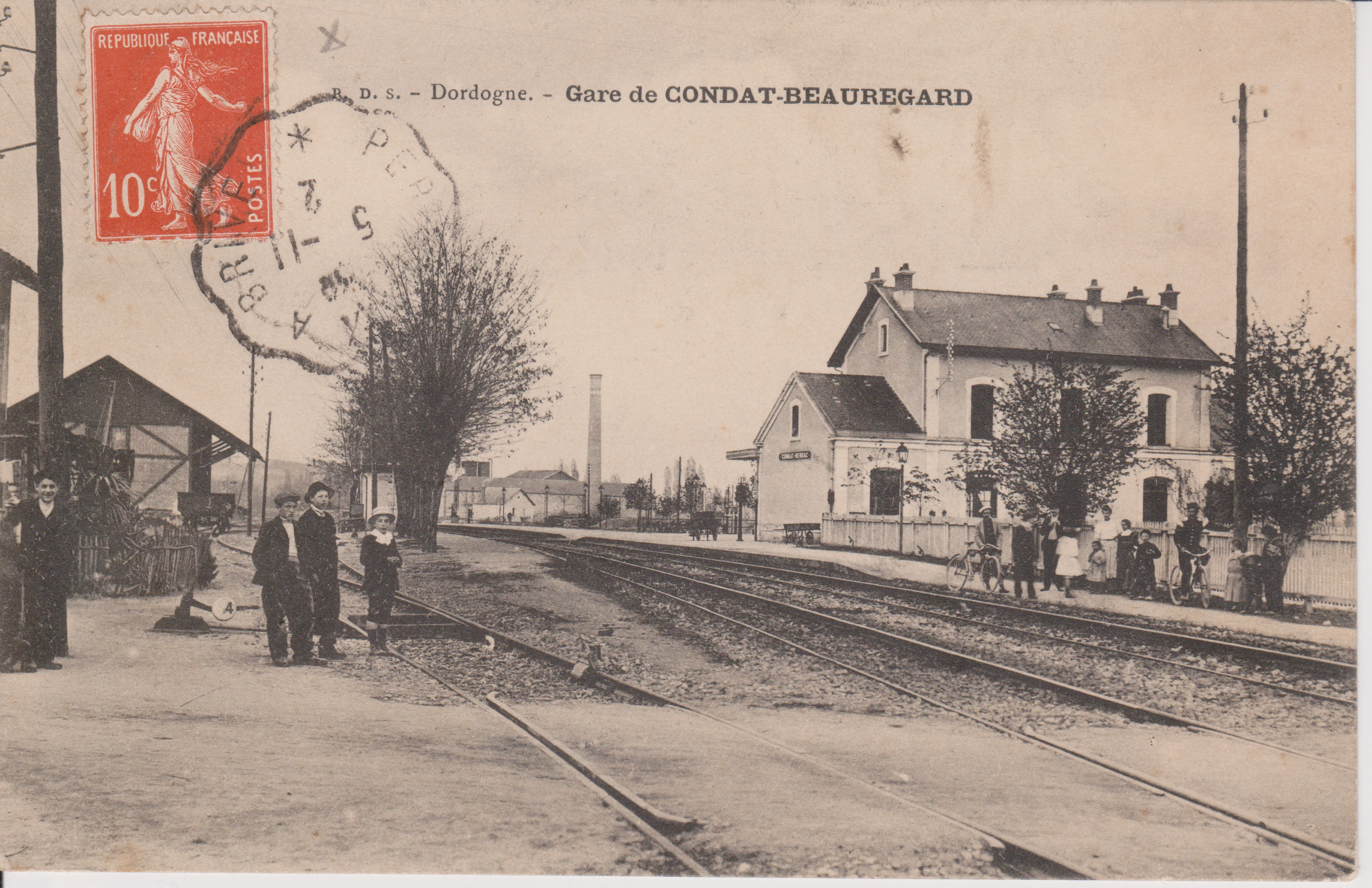 carte postale ancienne